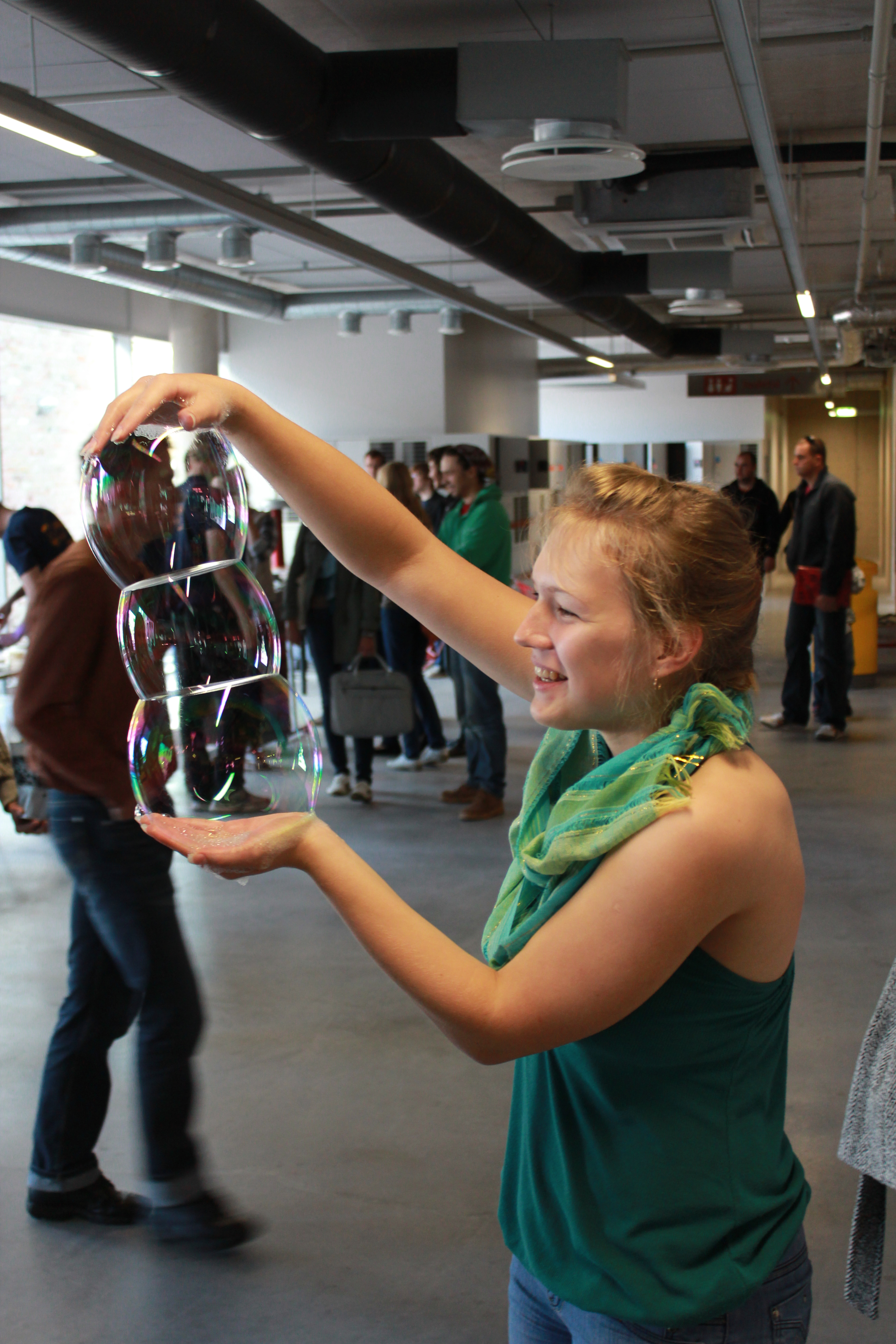 Teadushuviline omaloodud mullitorniga